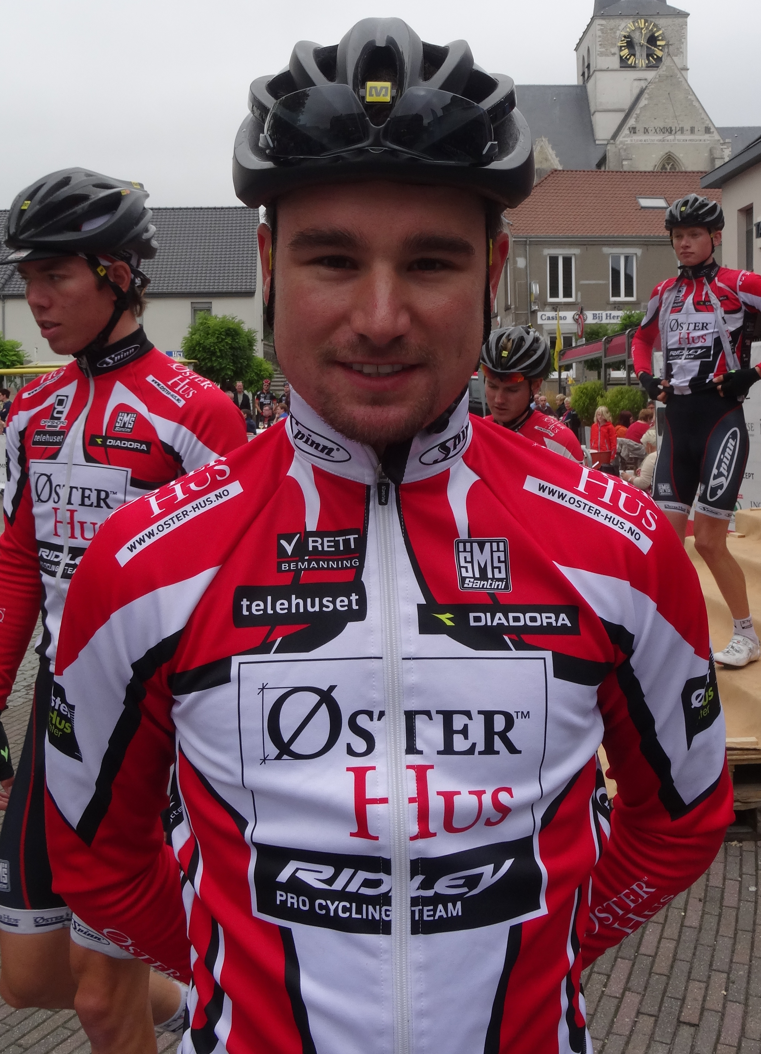 Reportage photographique réalisé le mercredi 27 août à l'occasion du départ de la Druivenkoers Overijse 2014 à Huldenberg, Belgique.